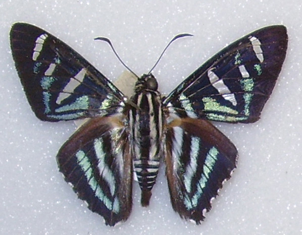 Jemadia petrobas Tingo Maria, Peru September, 1971